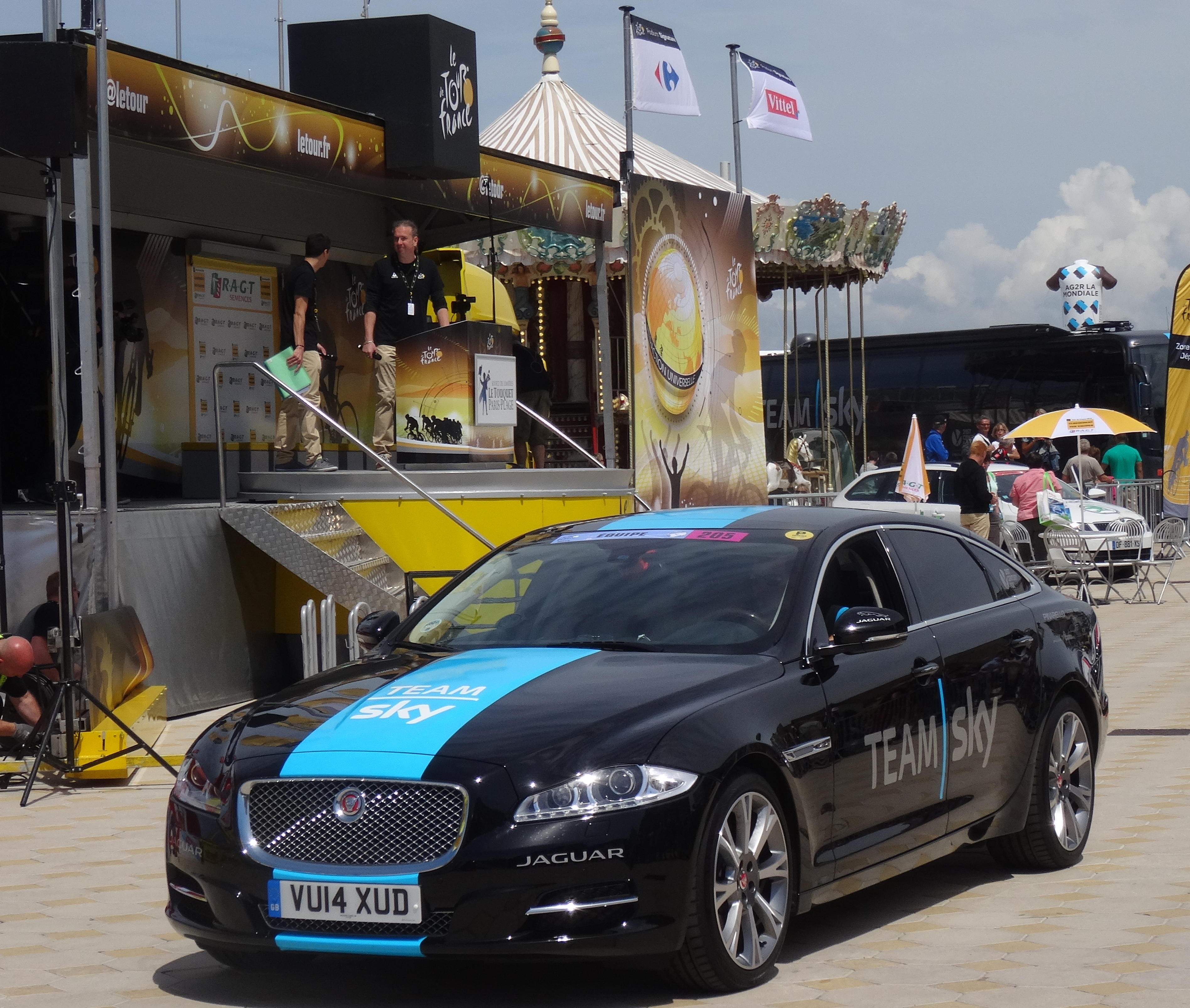 Reportage photographique réalisé le mardi 8 juillet à l'occasion du départ de la quatrième étape du Tour de France 2014 au Touquet-Paris-Plage, Nord-Pas-de-Calais, France.